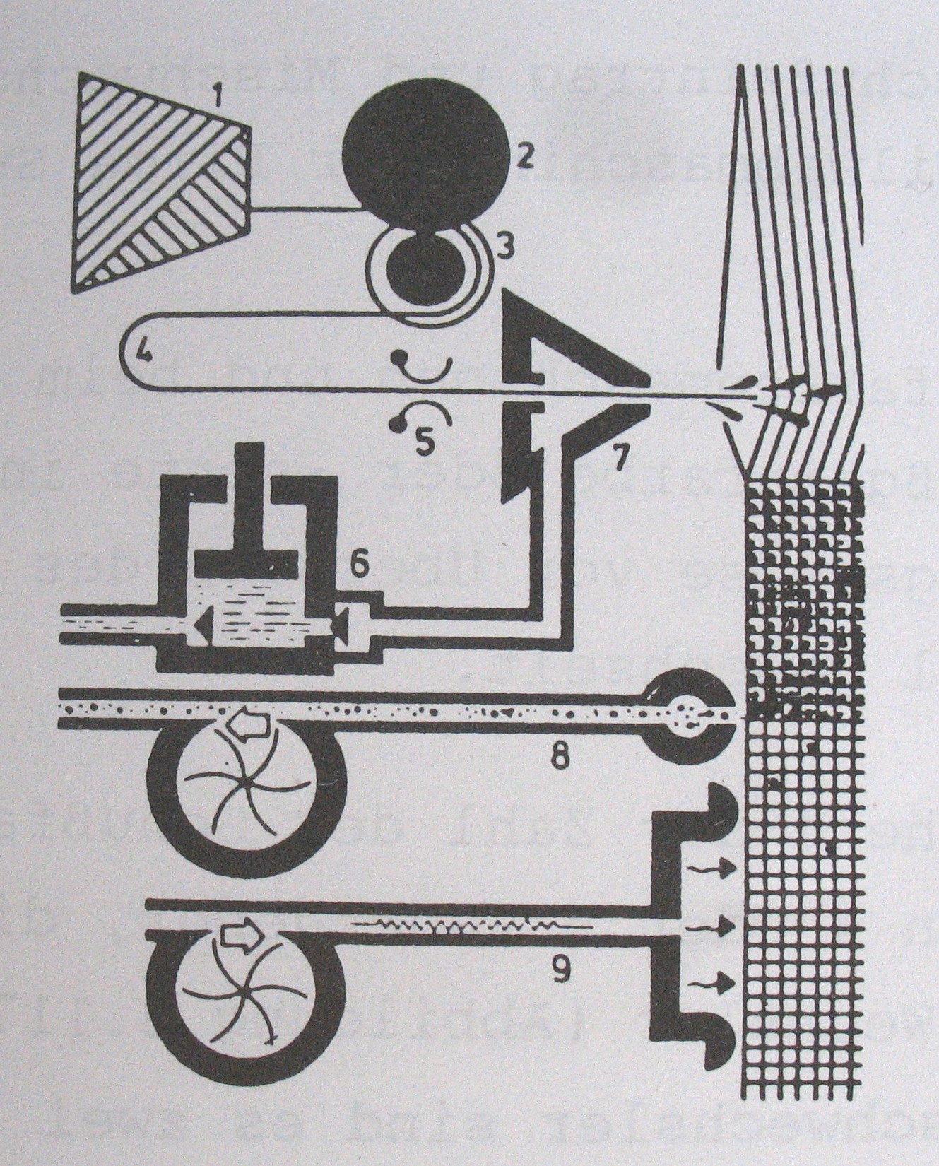 Schema: Schusseintrag am Wasserdüsenstuhl